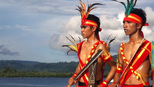 Festival Teluk Jailolo digelar tiap tahun oleh Pemda Halmahera Barat. Sebuah upaya menghargai laut sebagai sumber kehidupan.